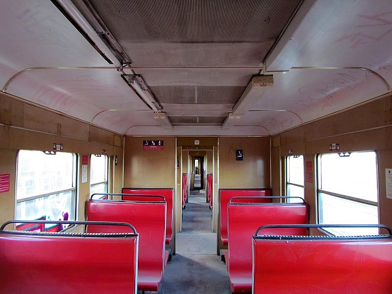 Wnętrze z pełnymi ściankami międzyprzedziałowymi wagonu doczepnego elektrycznego zespołu trakcyjnego EW58-005, który został włączony jako czwarty wagon do składu EW58-011.